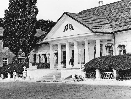 Поміщицький маєток (село Котовка, Магдалинівський район, Дніпропетровська область)